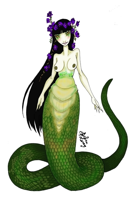 Echidna